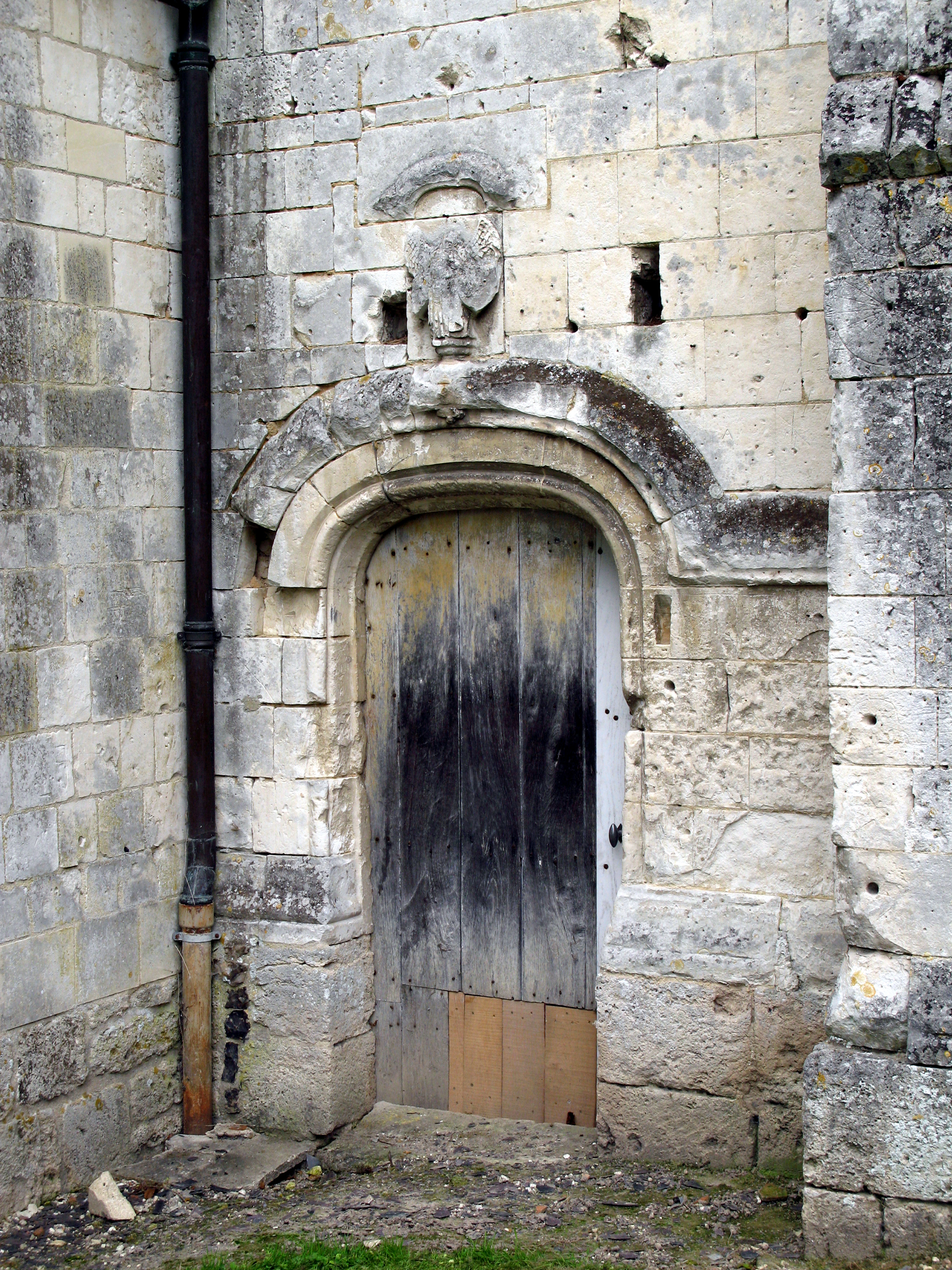 Fieffes-Montrelet (Somme, France) - La porte sud de l'église de Fieffes.